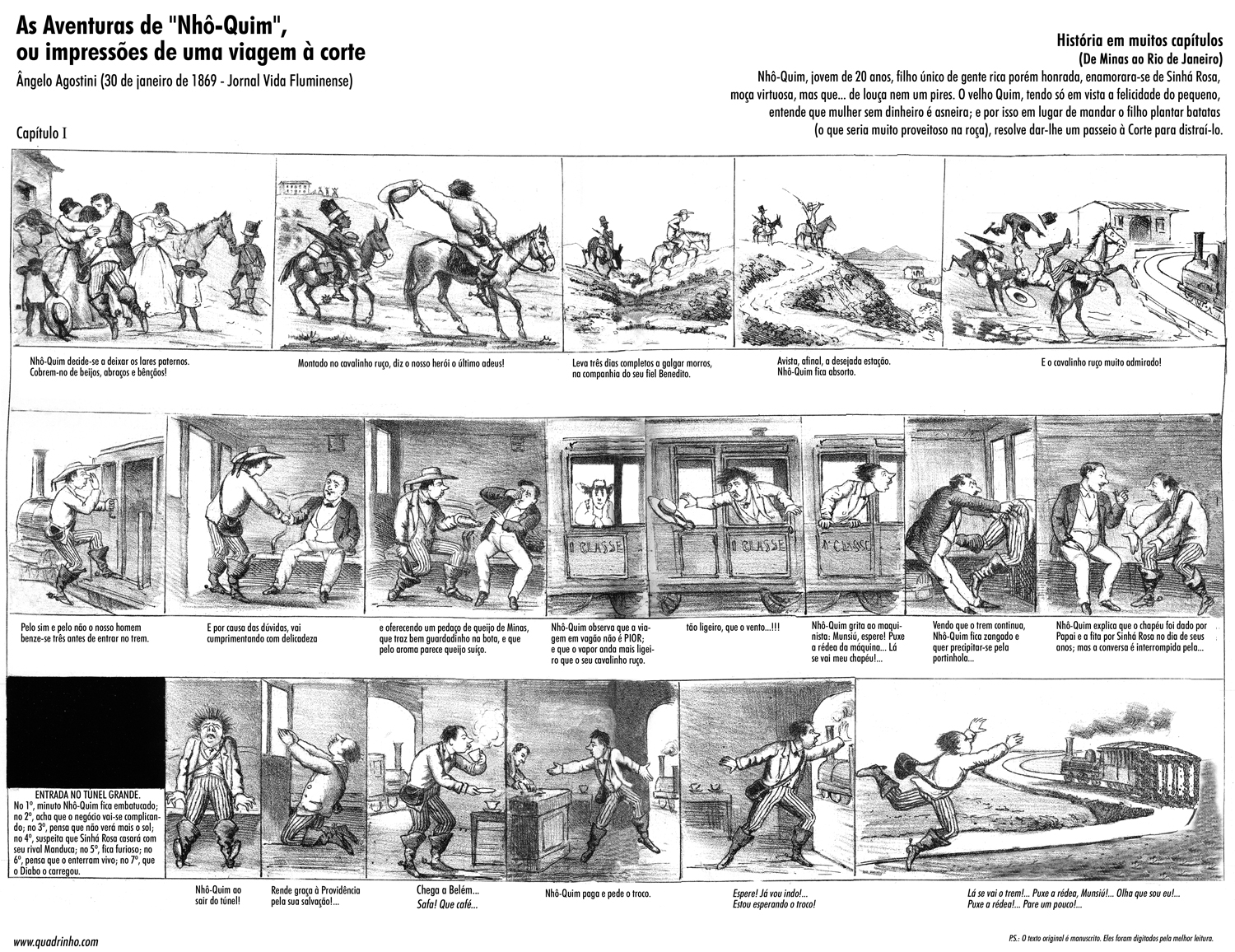 As Aventuras de Nhô Quim ou Impressões de Uma Viagem à Corte, a primeira banda desenhada brasileira